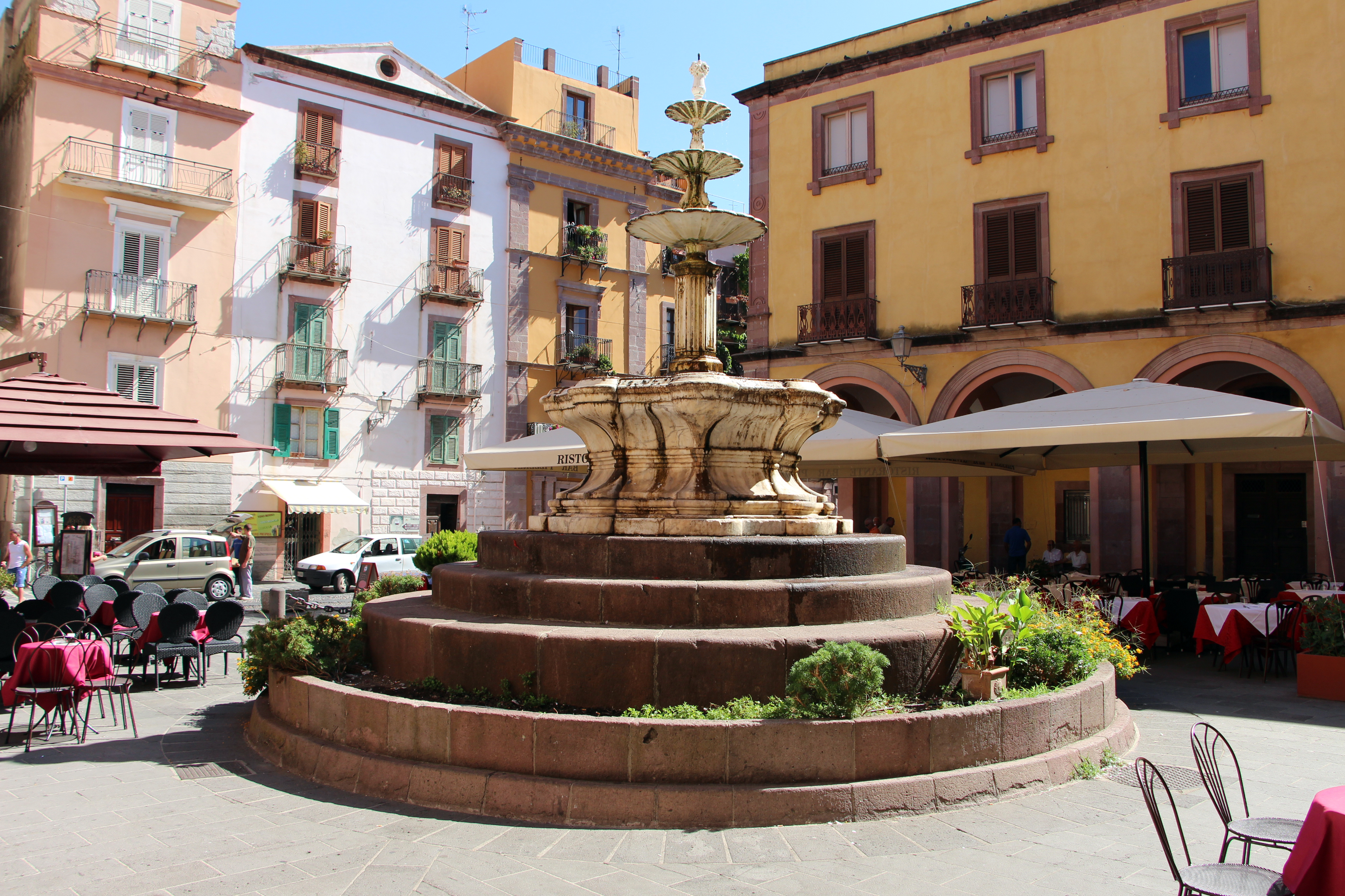 Sa Puntana Manna (fontana di piazza Costituzione) The making of this document was supported by Wikimedia CH. (Submit your project!) For all the files concerned, please see the category Supported by Wikimedia CH. This is a photo of a monument which is part of cultural heritage of Italy.